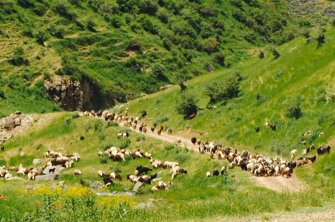 Ləkətağ yaxınlığı